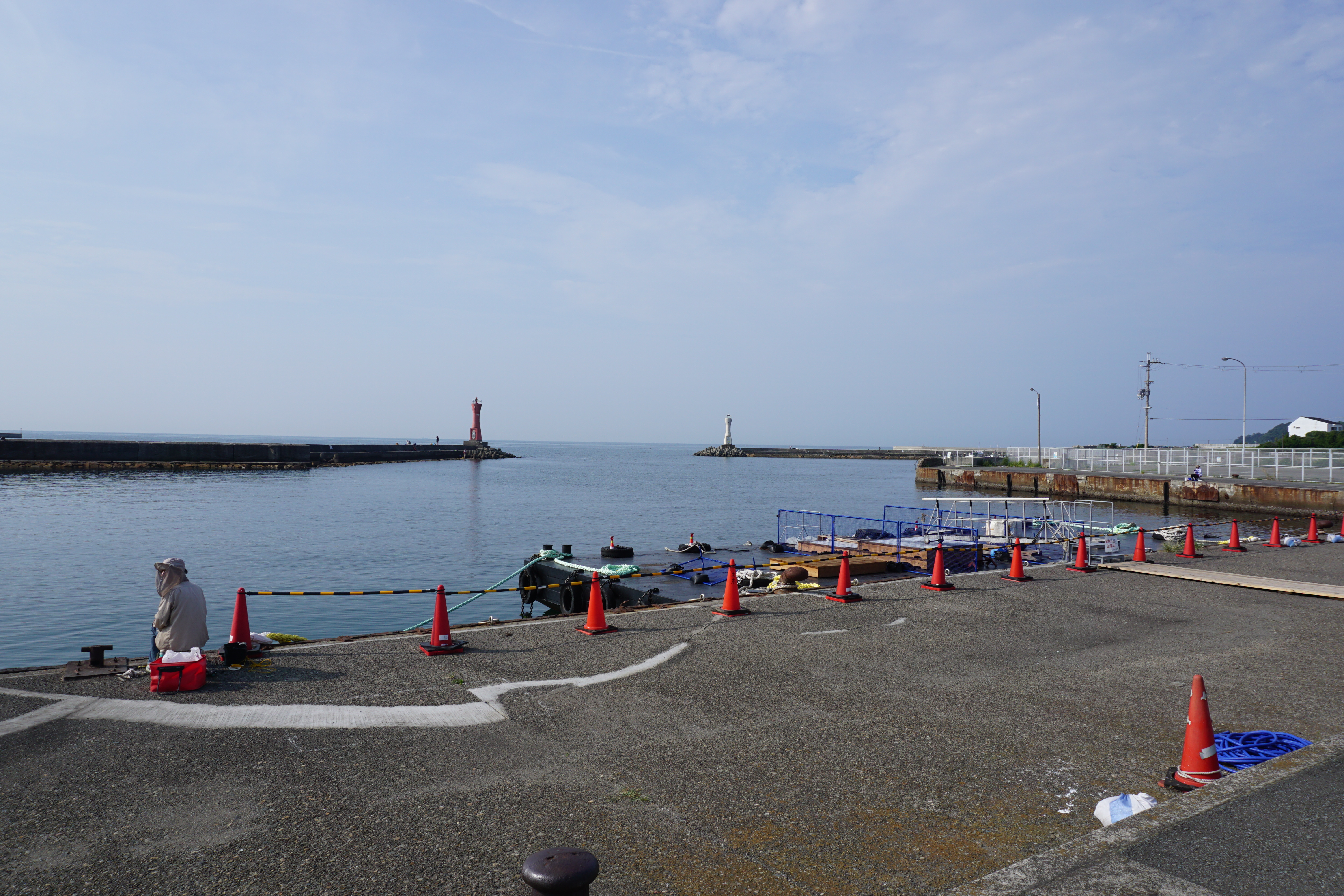 深日港桟橋付近